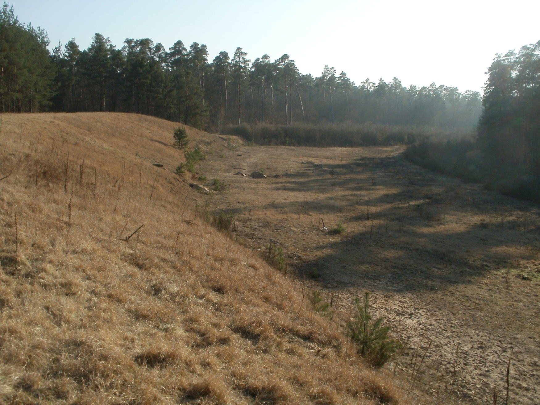 Sanddüne an der ehemaligen Ostkurve vom Hockenheimring